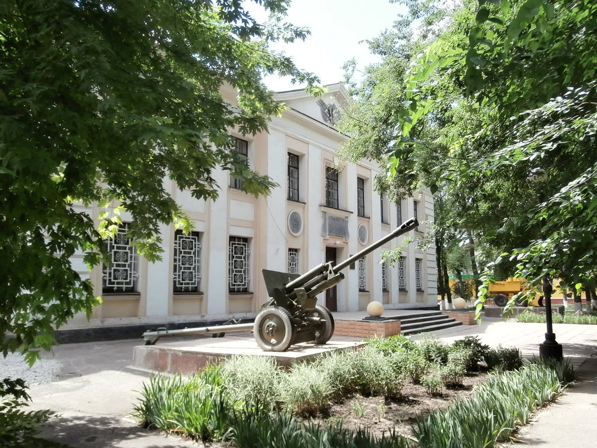 Schowti Wody Historisches Museum